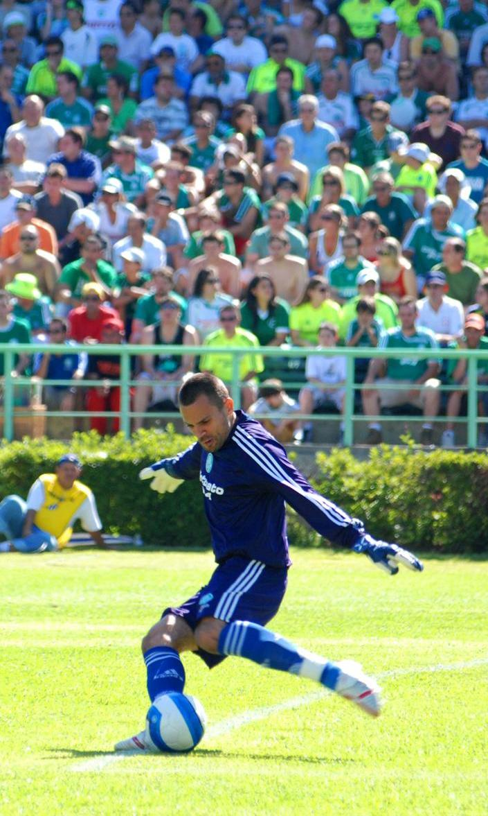 Goleiro Diego Cavalieri, do Palmeiras, em 2007, contra o Atlético Mineiro, cobrando tiro de meta.